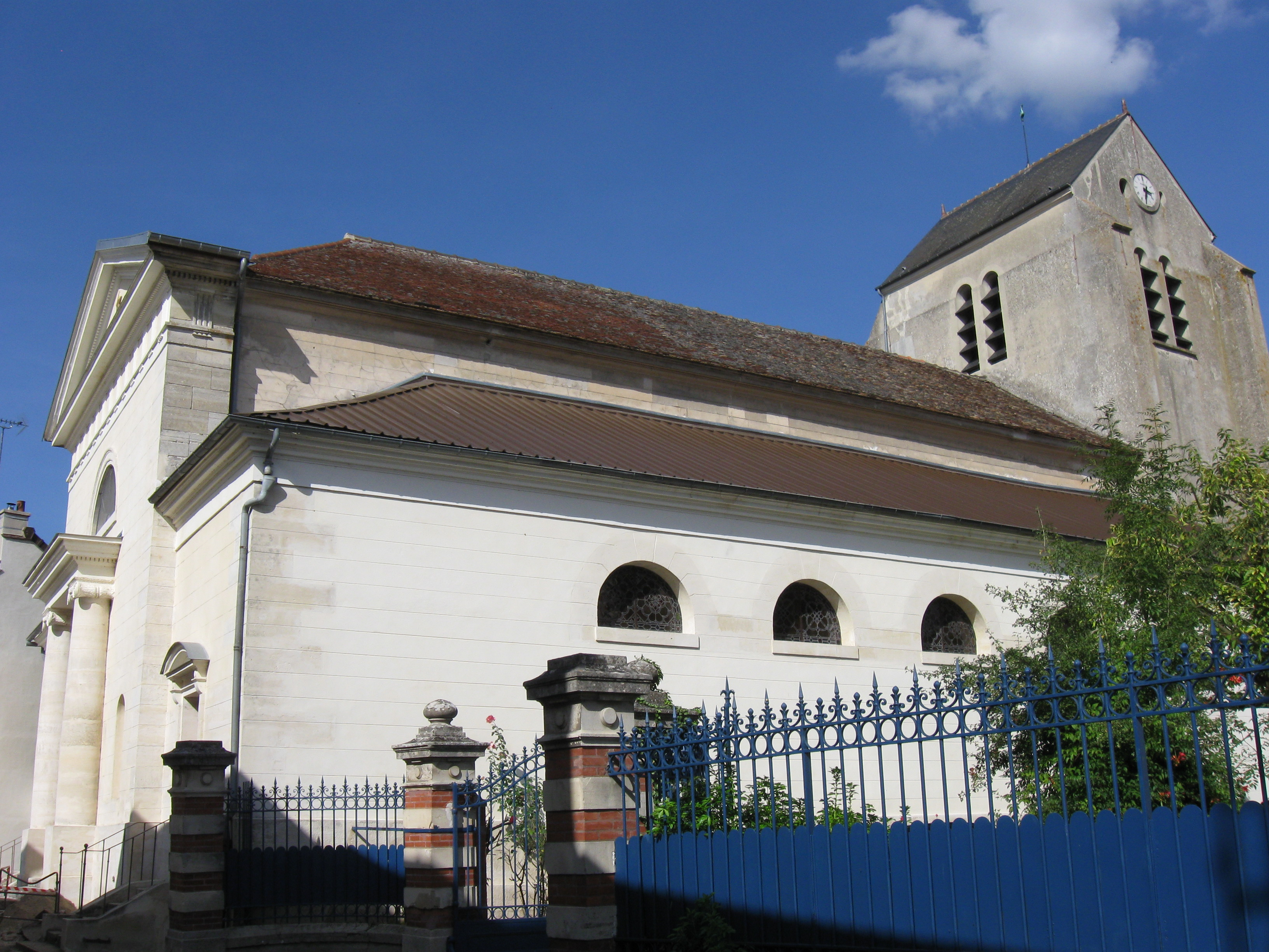 Église Sainte-Geneviève de Trilbardou. (Seine-et-Marne, région Île-de-France).